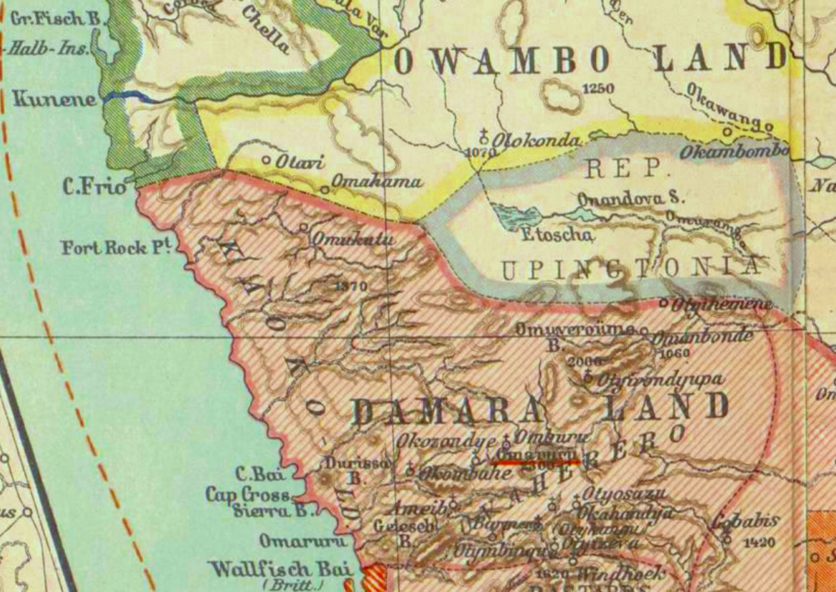 Kartenausschnitt des nördlichen Südwestafrika mit der "Republik Upingtonia" aus dem Jahr 1886.